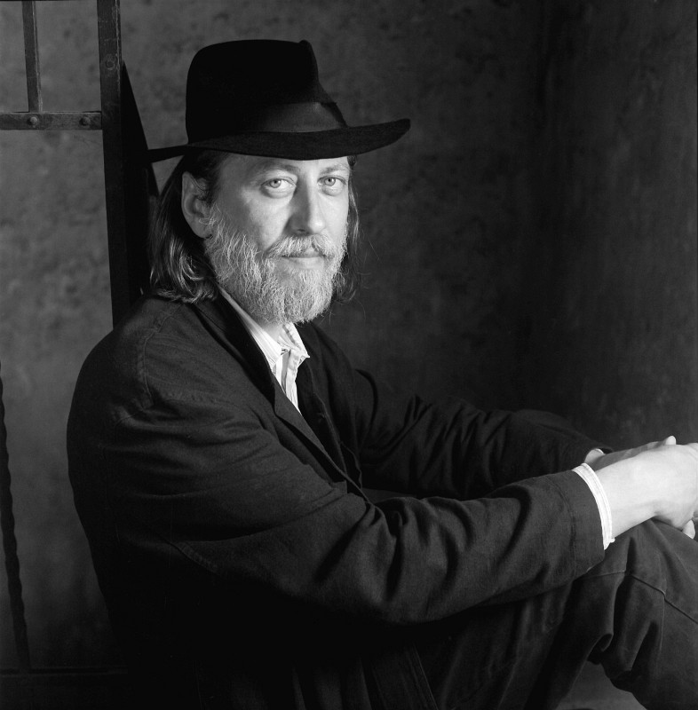 Krasznahorkai László Kossuth-díjas magyar író.